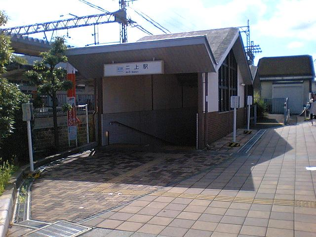 2007年6月23日 近鉄二上駅南口。投稿者自身が撮影